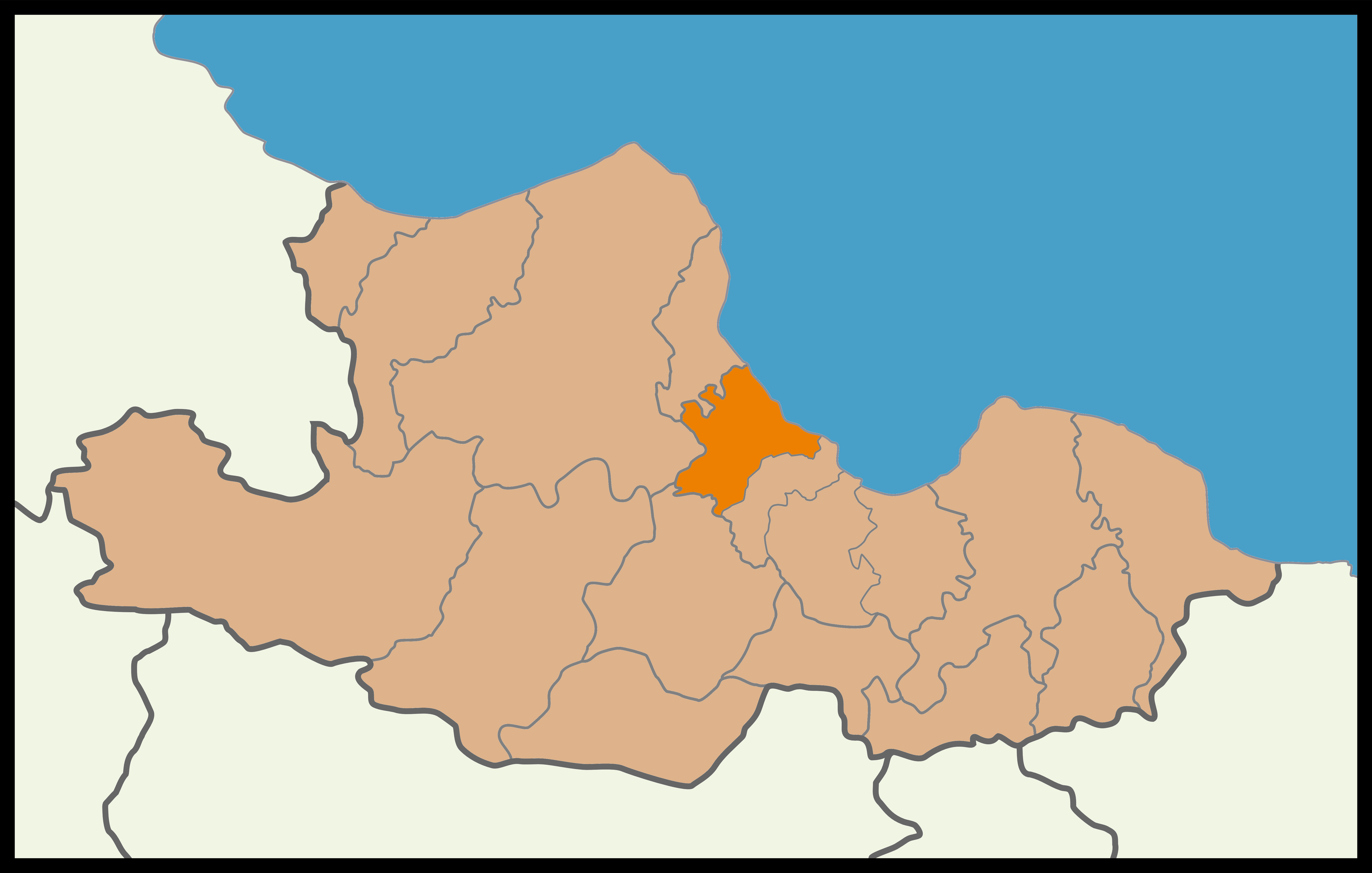 Samsun'un Atakum ilçesinin 2015 Türkiye genel seçimleri haritası.